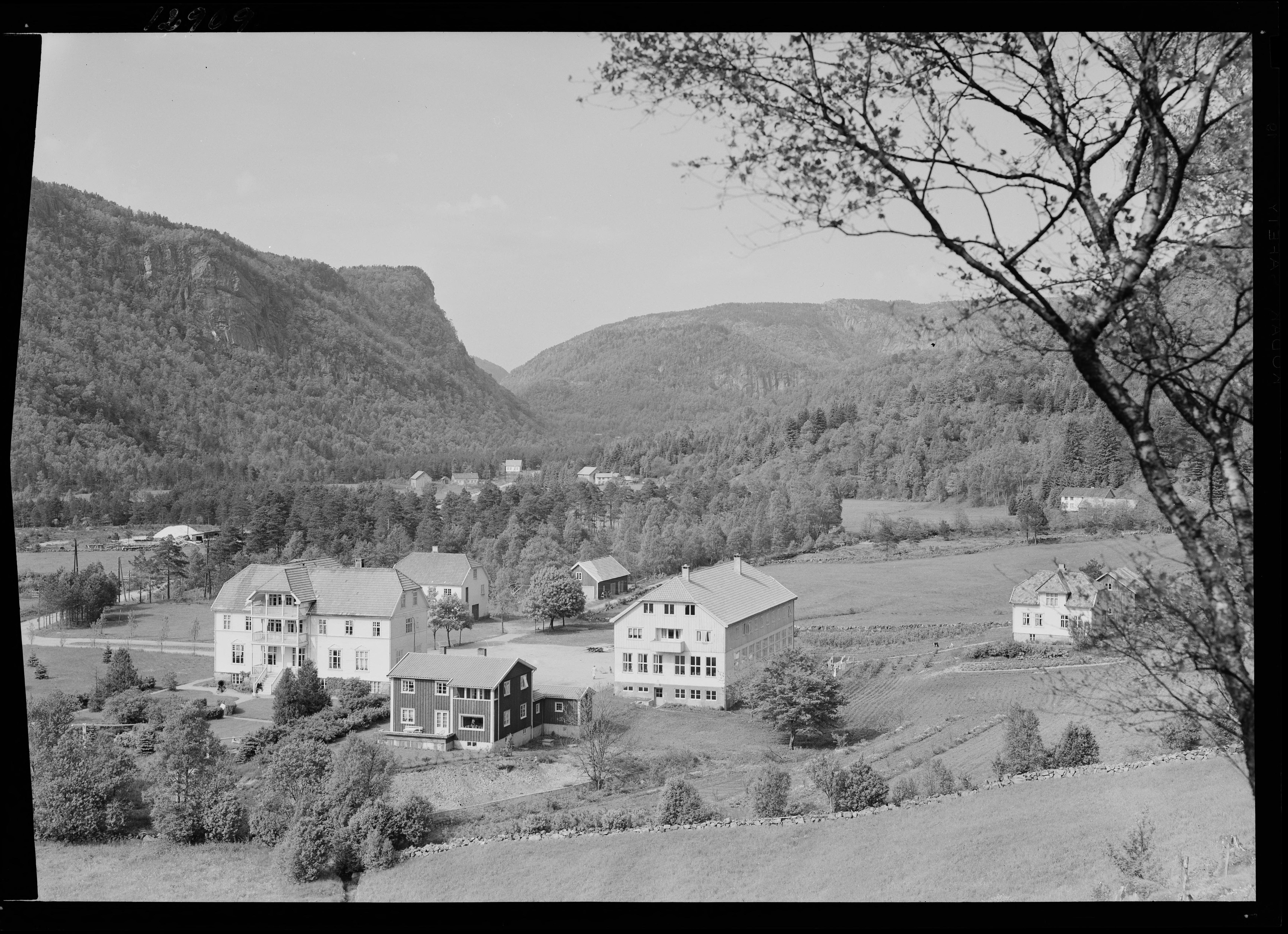 Bildet er hentet fra Nasjonalbibliotekets bildesamling. Anmerkninger til bildet var: Fotograf : ukjent Kvås, Lyngdal, Vest Agder